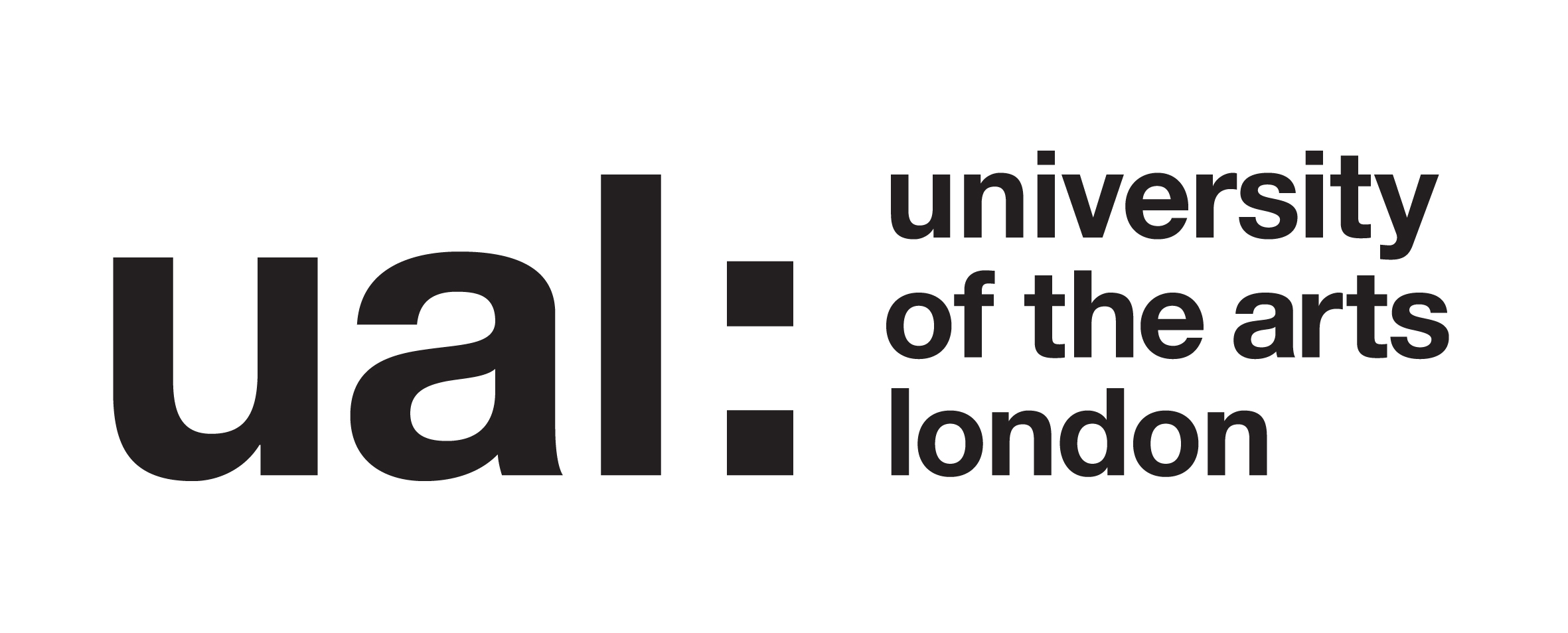 UAL-LOGO